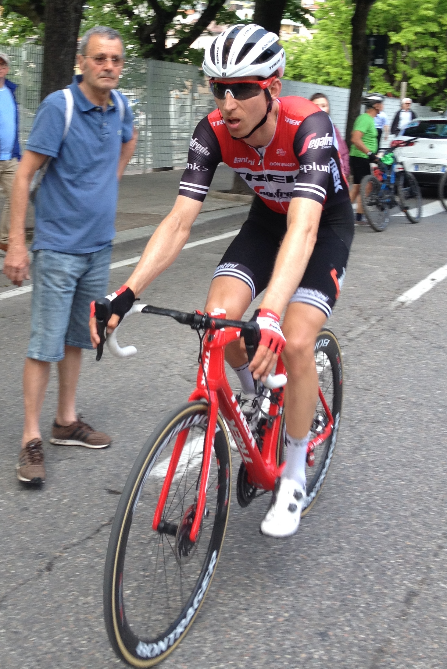 Finish van de 15e etappe van de Giro d'Italia in Como op zondag 26 mei 2019.